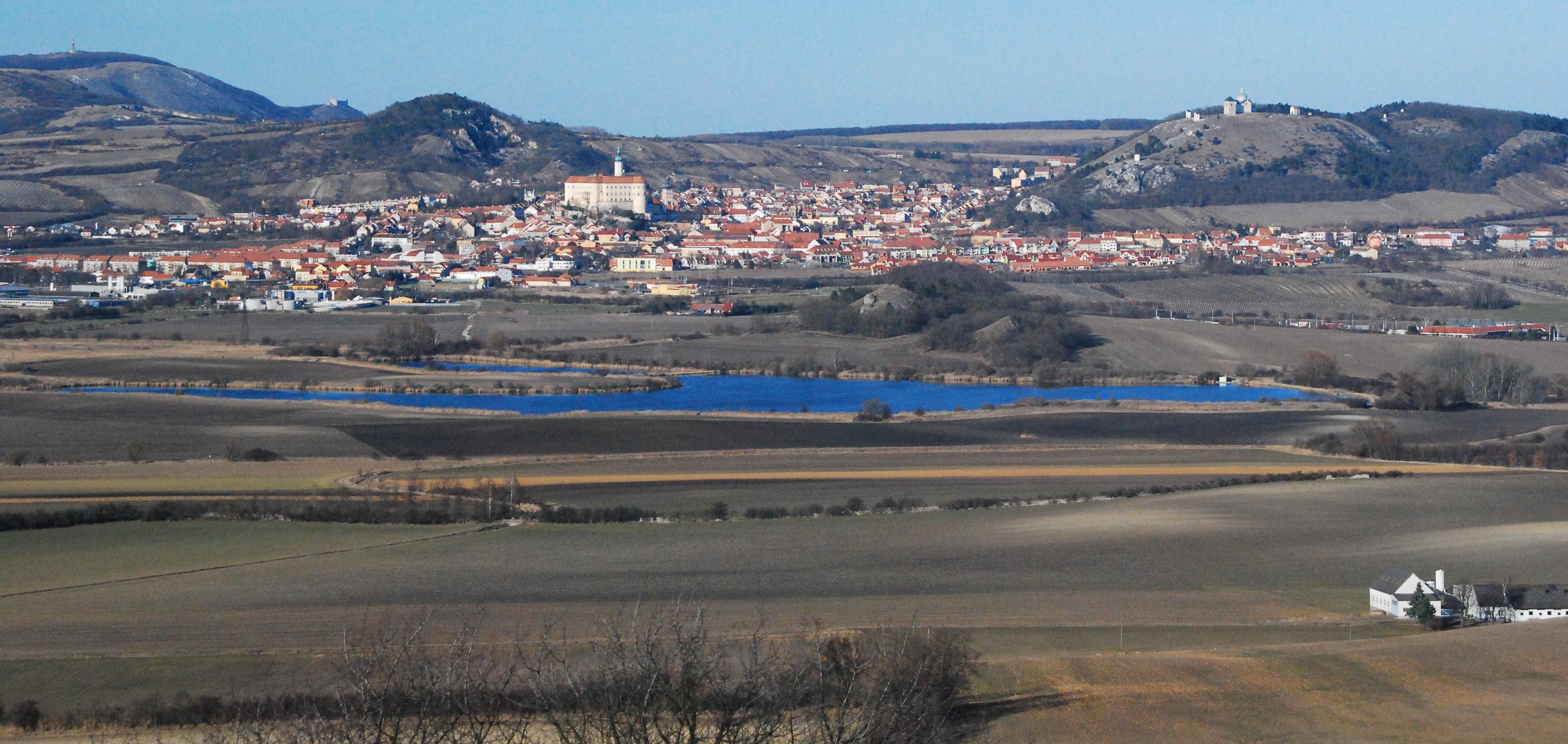 Ausblick auf Nikolsburg/Mikulov vom Schweinbarther Berg in Kleinschweinbarth in Niederösterreich